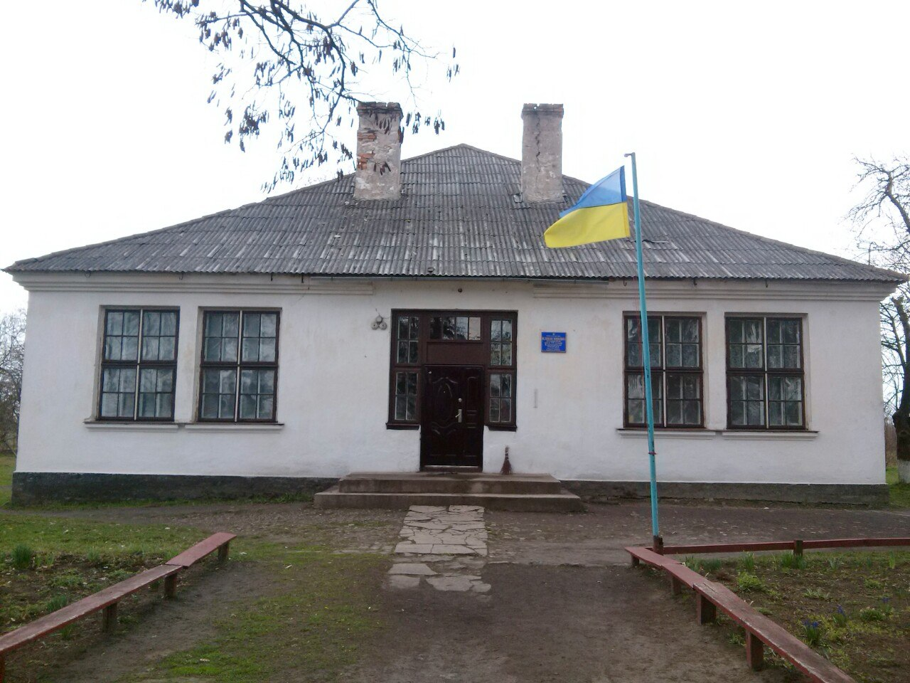 Фото зроблене для індивідуально-дослідного завдання з географічного краєзнавства